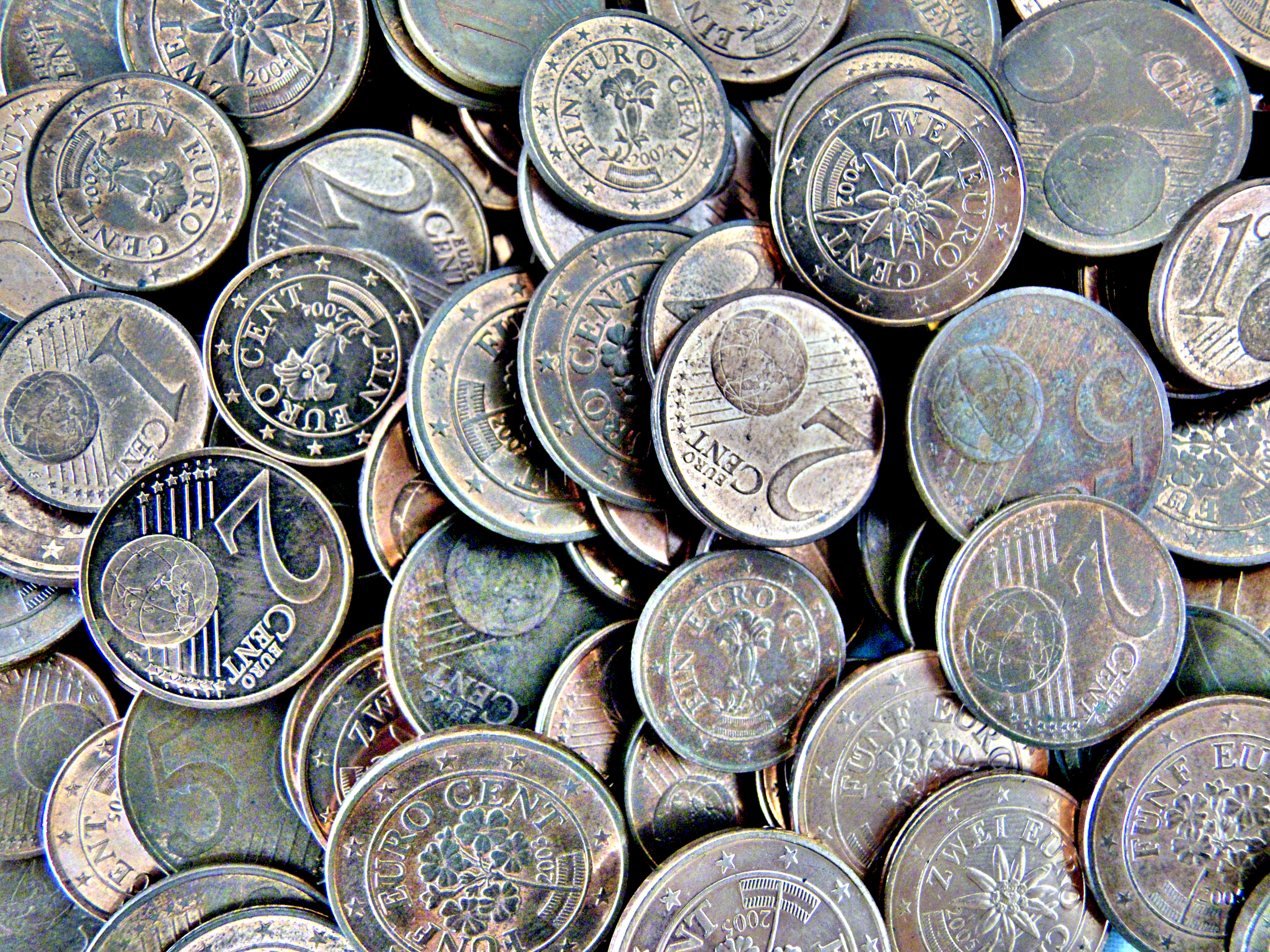 Cent Stücke